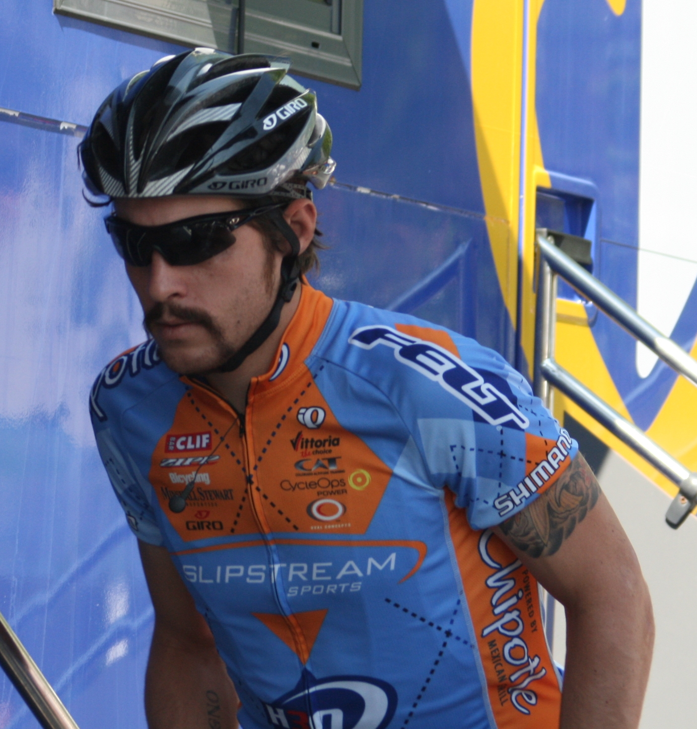 Steven Cozza, aux Quatre jours de Dunkerque 2008